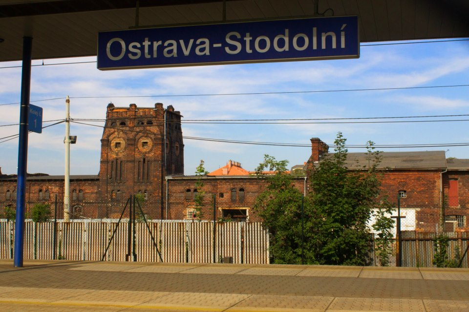 Bývalá městská jatka, Moravská Ostrava, Porážková, Ostrava